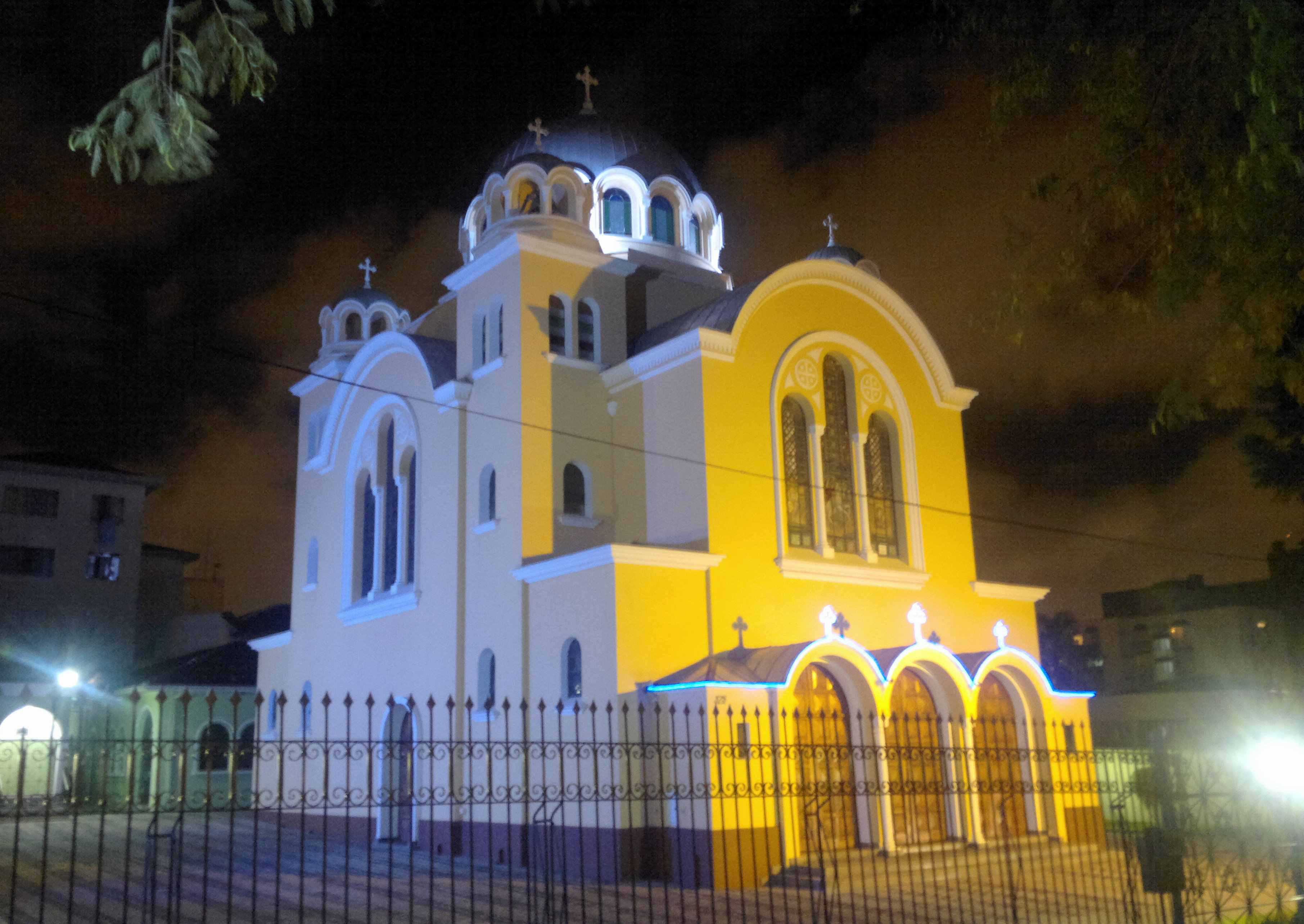 Imagem noturna da Igreja Ortodoxa Antioquina São Jorge em Curitiba, Paraná, Sul do Brasil.